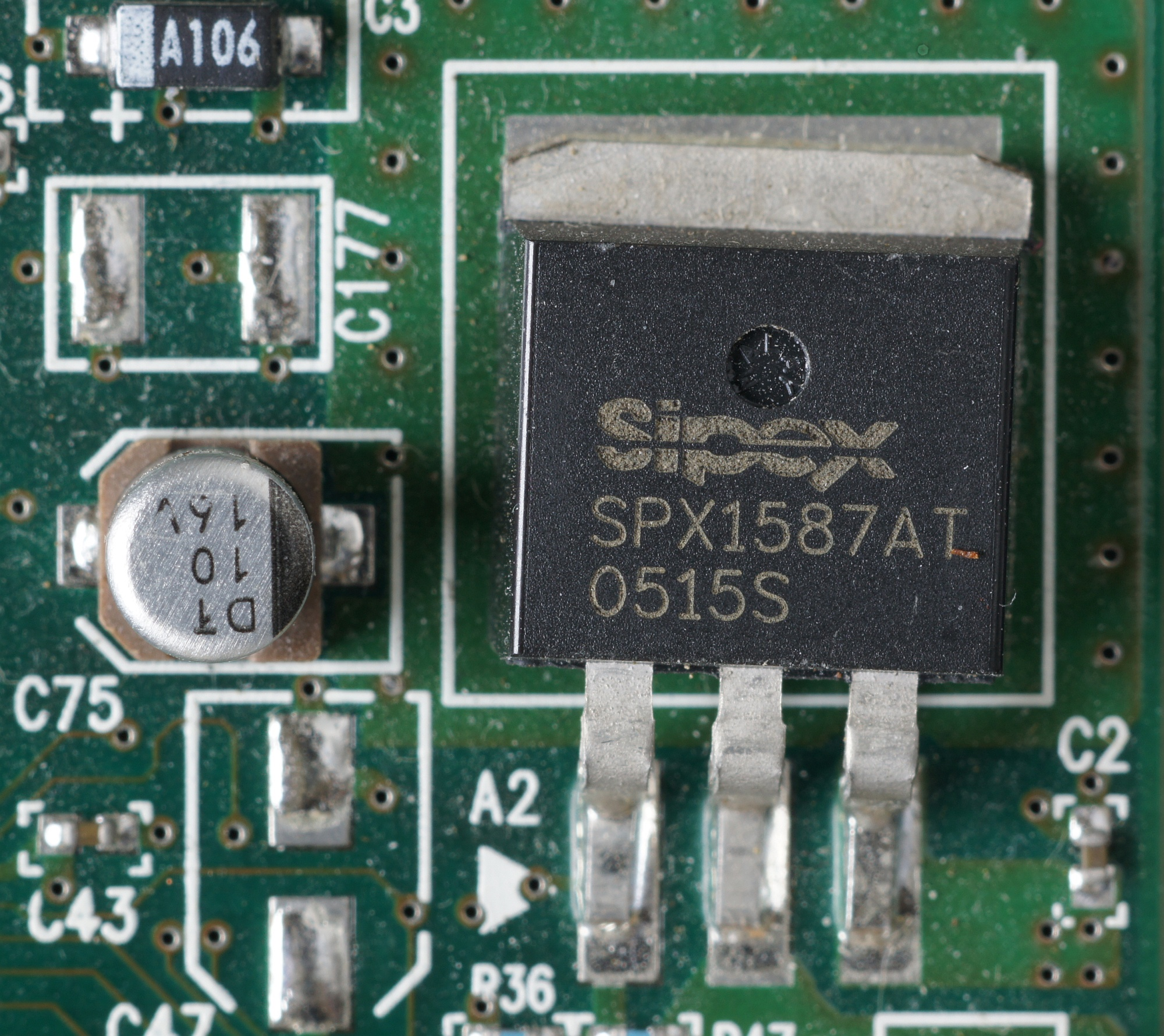 Einstellbarer Lowdrop Linearregler, 1.3V drop out @ 3A